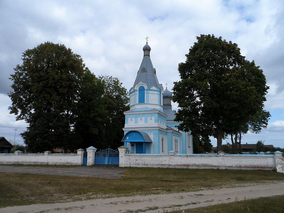 Варацэвічы. Царква